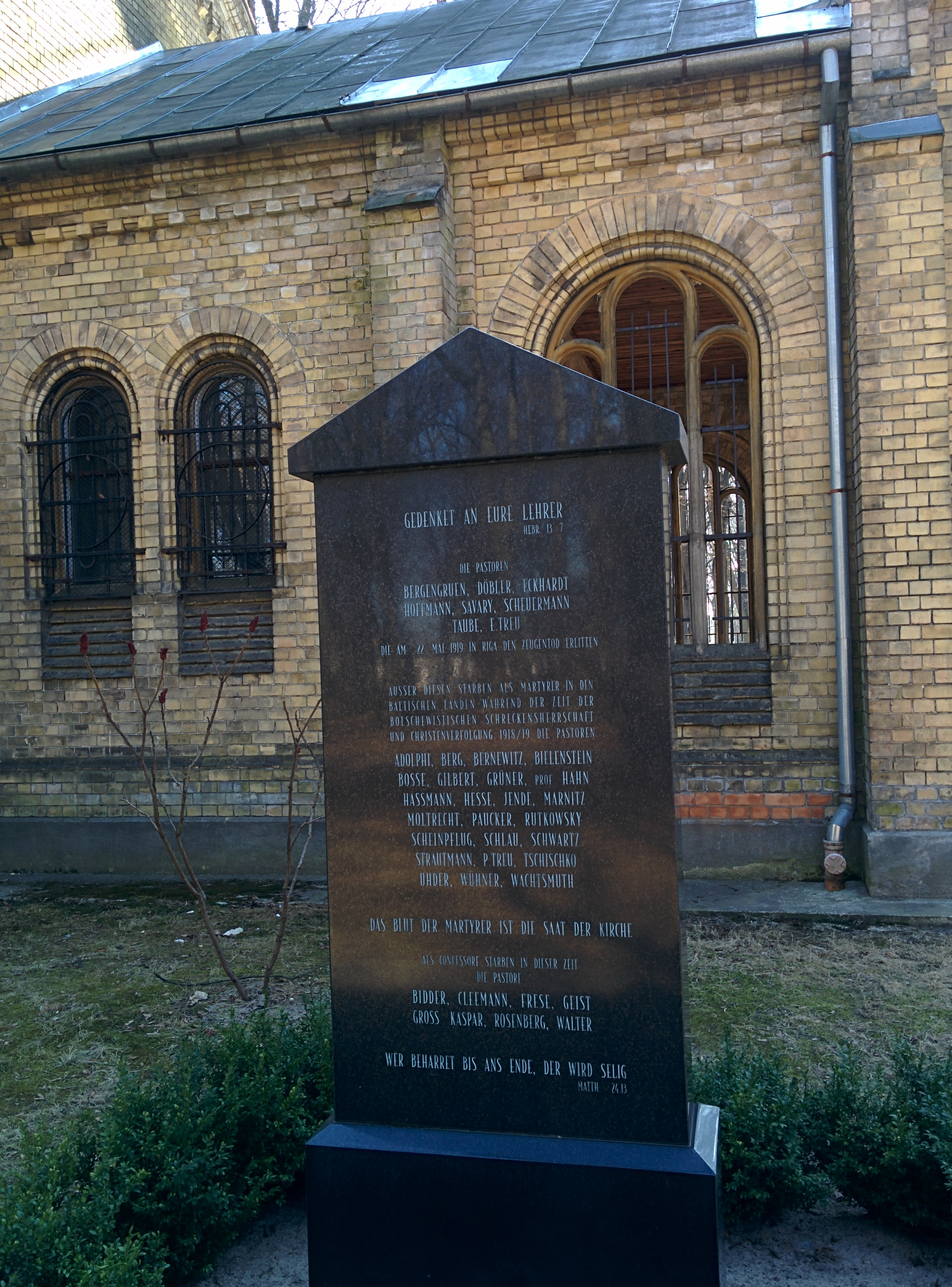 Gedenkstein für ermordete Pfarrer während der Zeit der lettischen SSR 1918-1919. Vorderseite in deutscher Schrift.